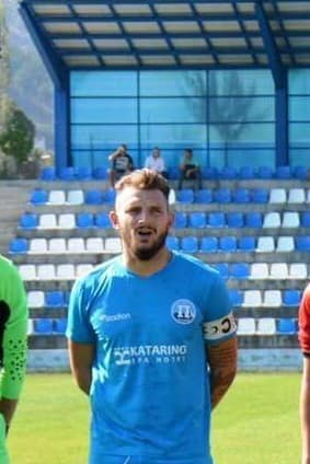 Димитър Мавродиев